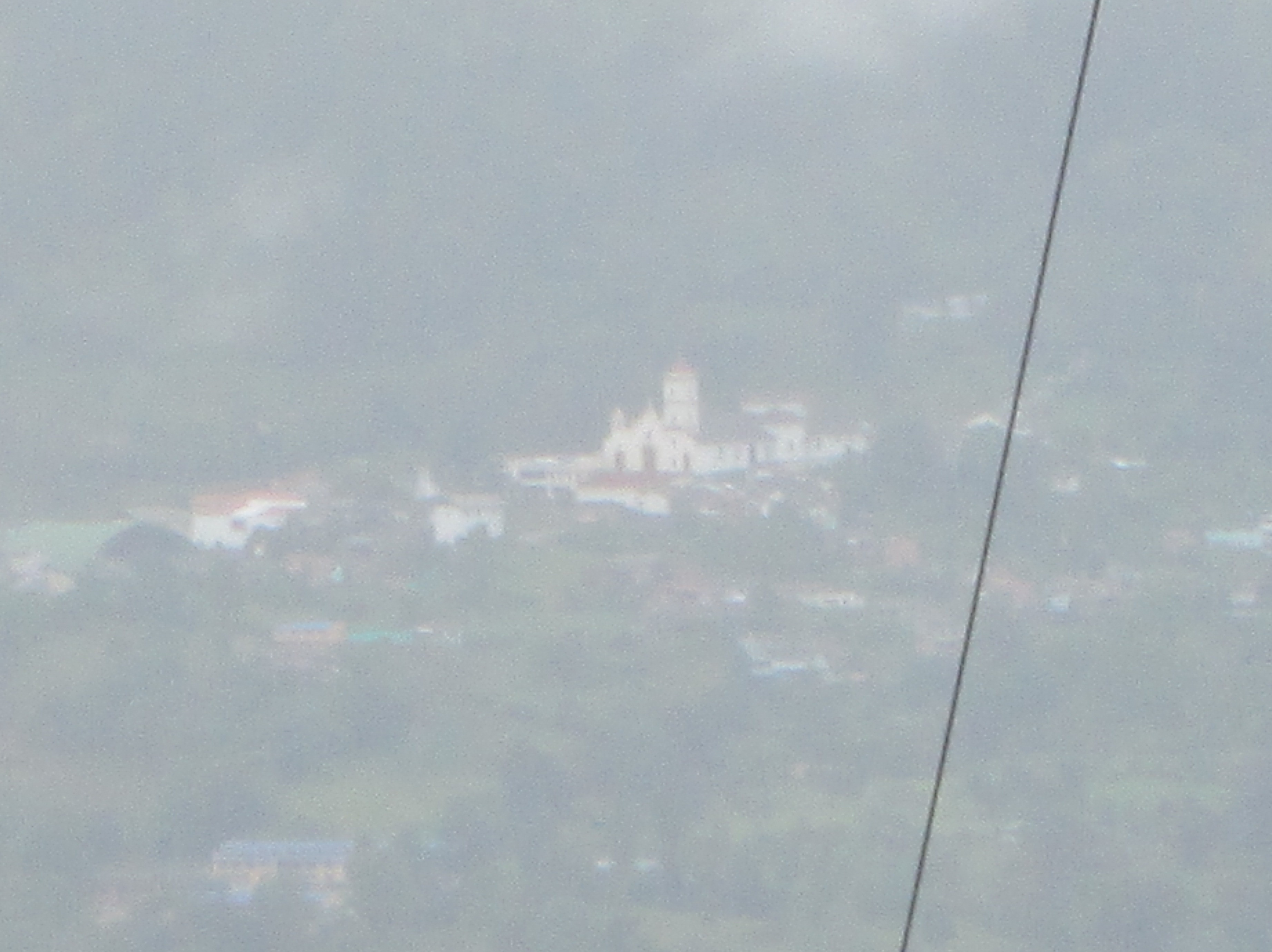 Vista de Somondoco desde Guateque